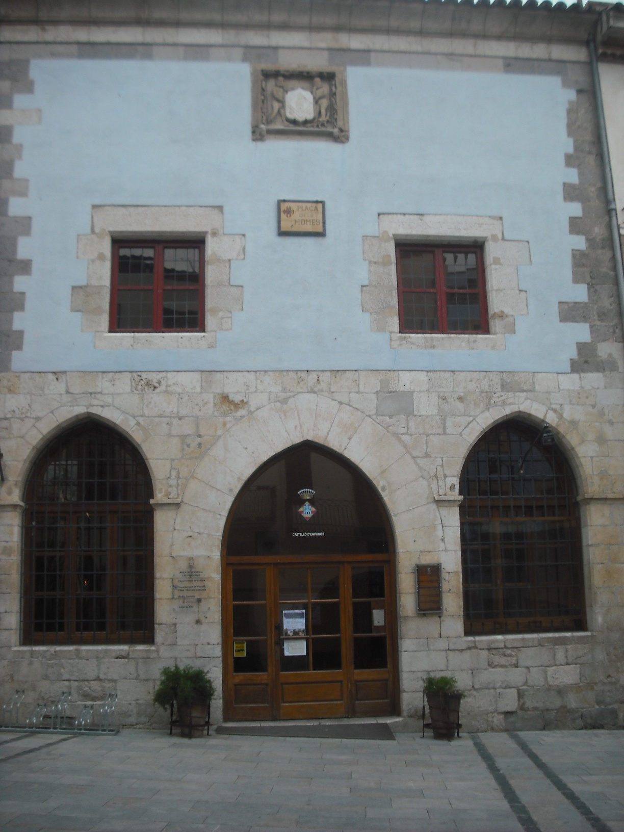 Llotja de Castelló d'Empúries.